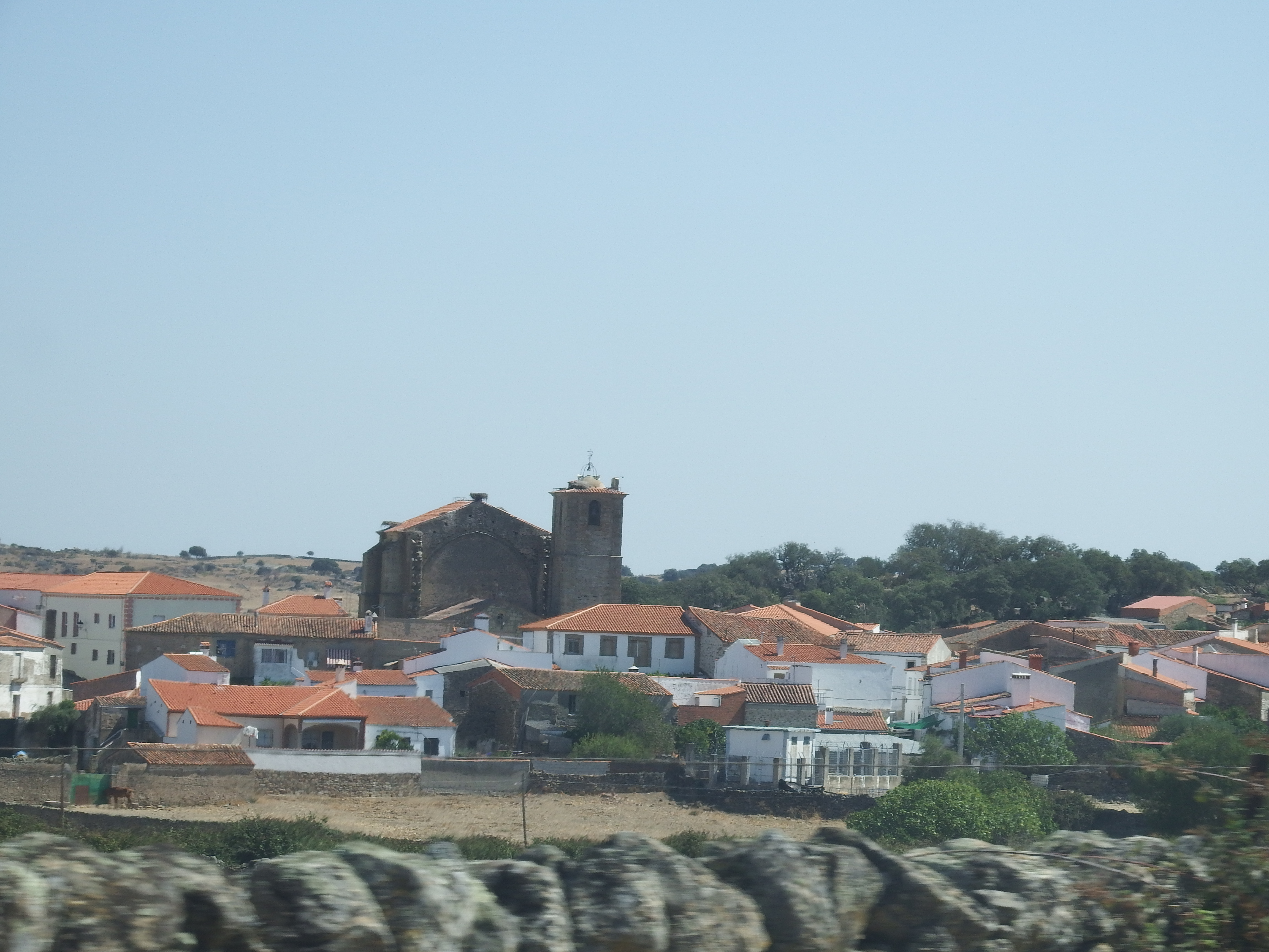 Mata de Alcántara